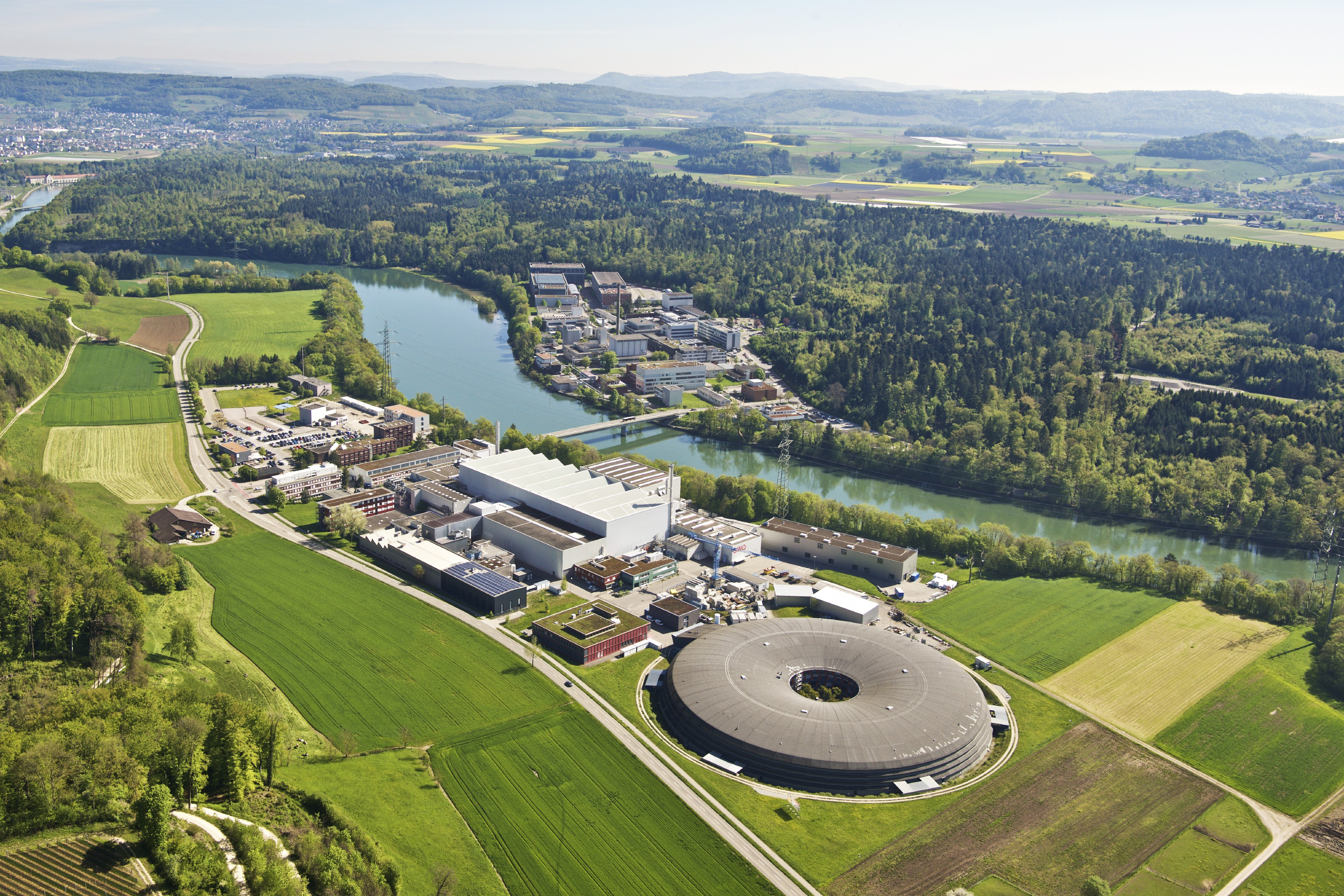 Luftaufnahme des Paul Scherrer Instituts vom Mai 2016. Es liegt links und rechts der Aare im Kanton Aargau.